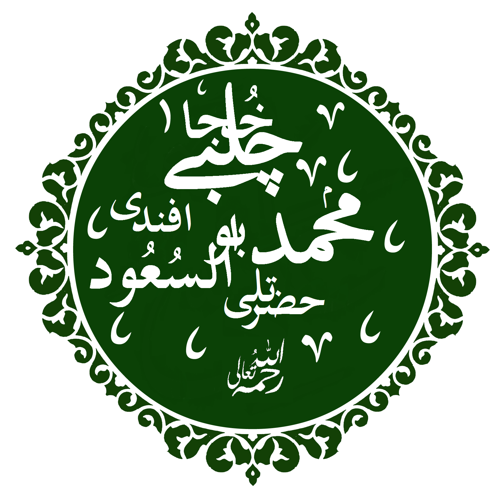 تخطيط لاسم شيخ الإسلام أبو السُعود أفندي العمادي.